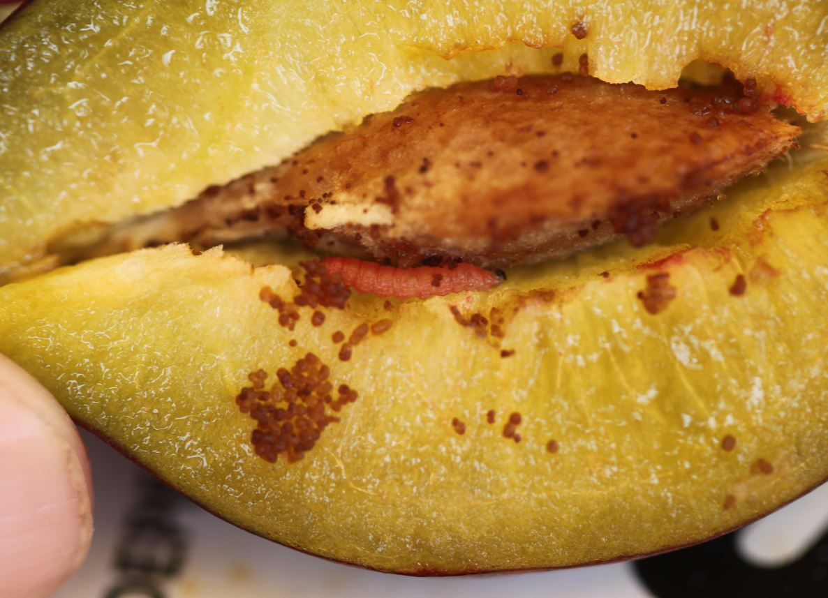 Raupe des Pflaumenwicklers (Grapholita funebrana)